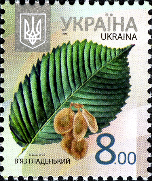 Восьмий випуск стандартних марок України. В'яз гладенький